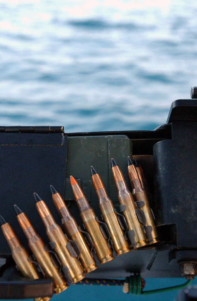 Ammo Loaded